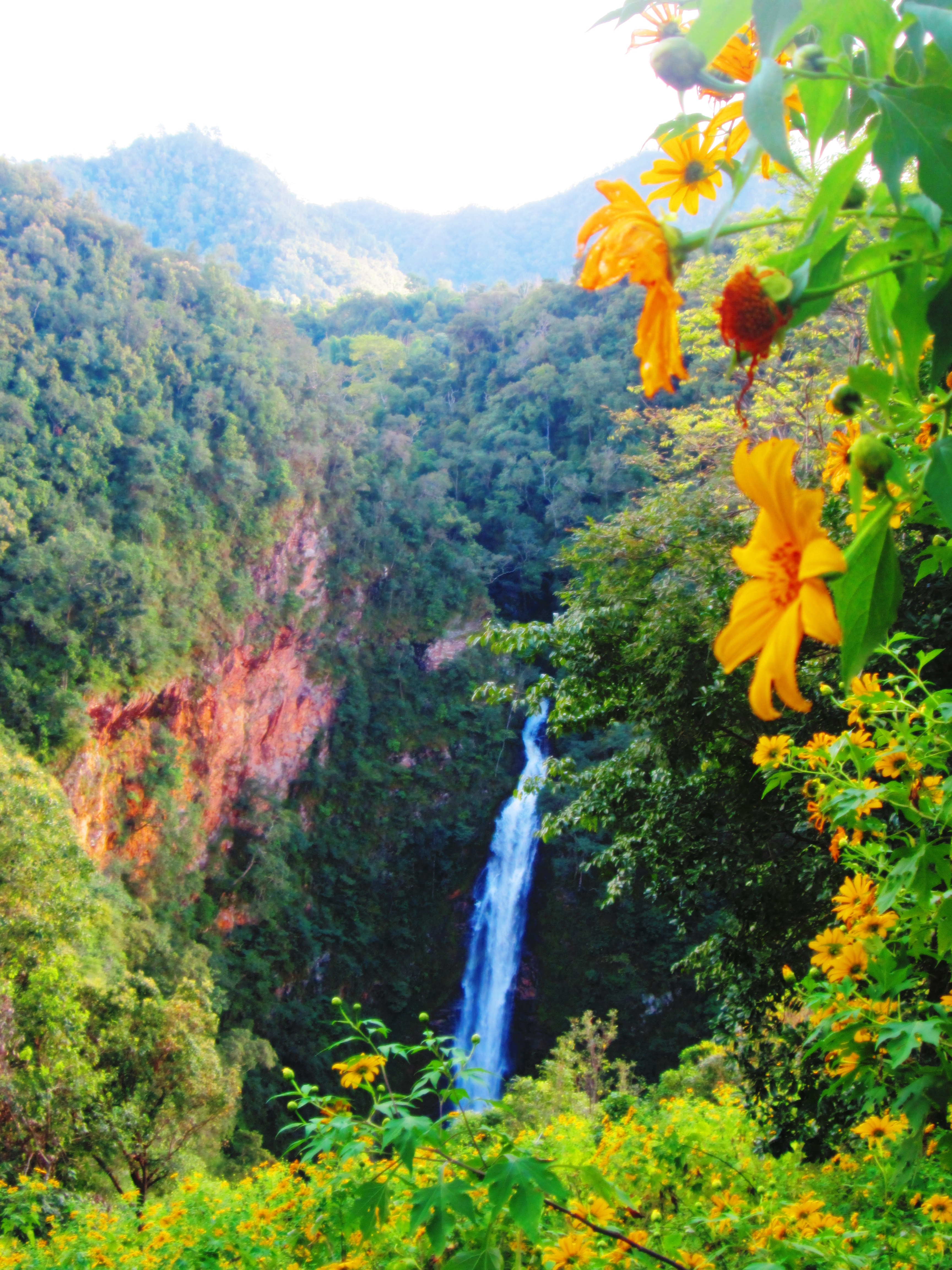 อุทยานแห่งชาติน้ำตกแม่สุรินทร์ จังหวัดแม่ฮ่องสอน